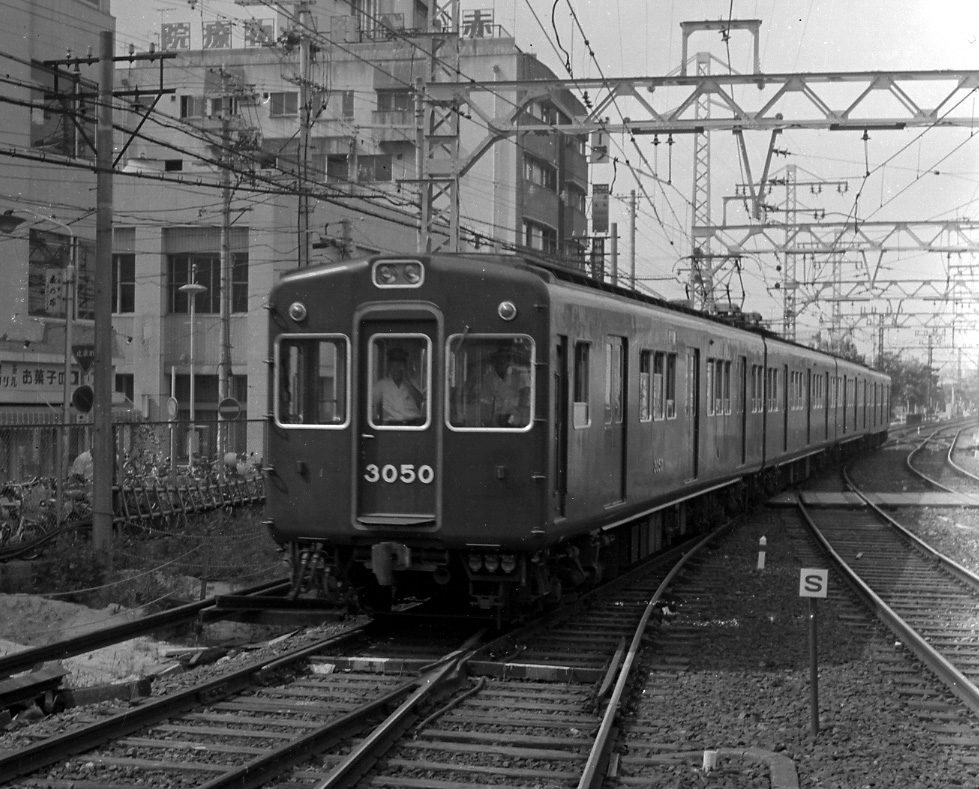 非冷房時代の阪急3000系Tcトップナンバー3050 1974年今津線西宮北口駅入換え中の姿。